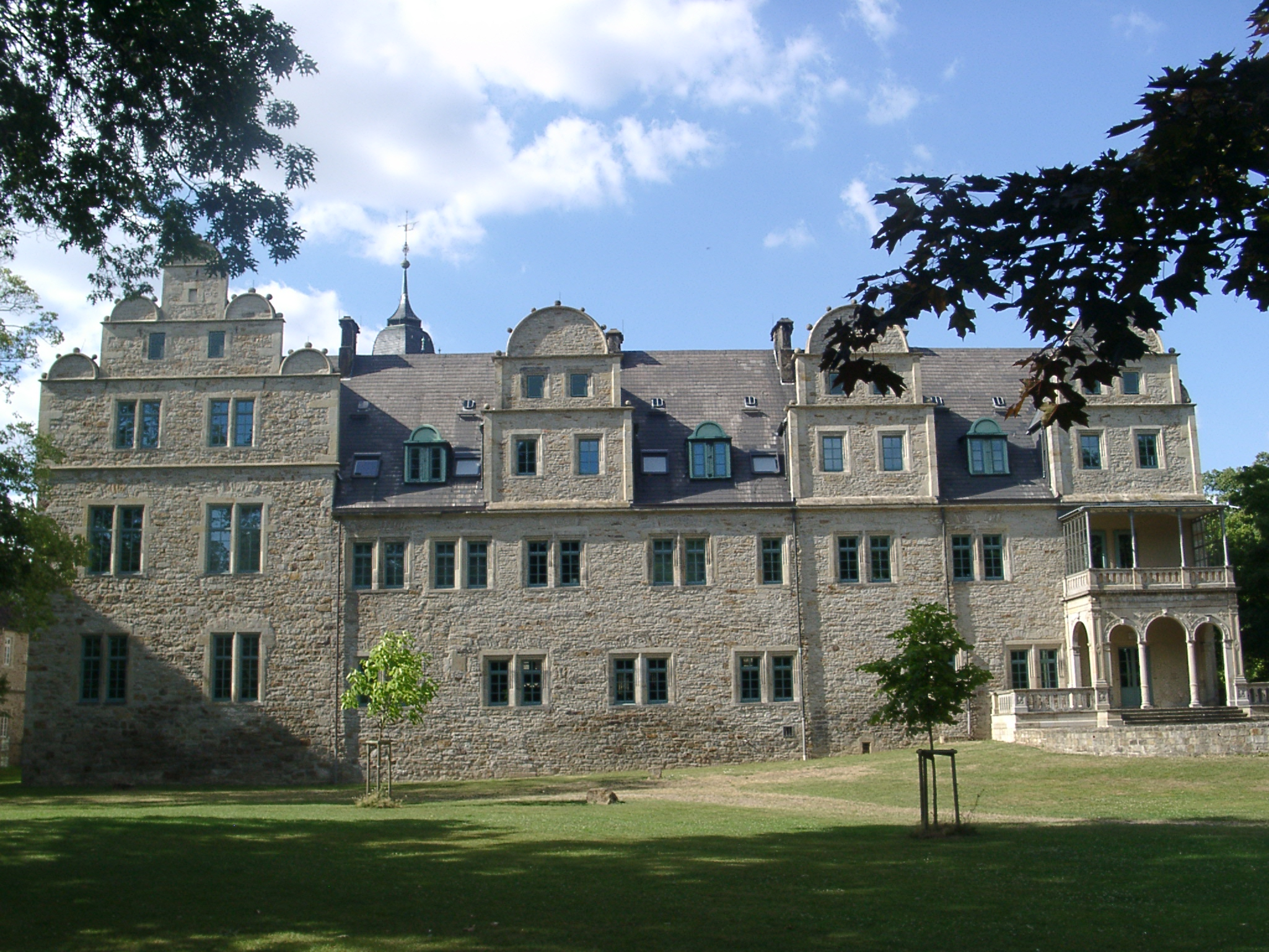 Stadthagen